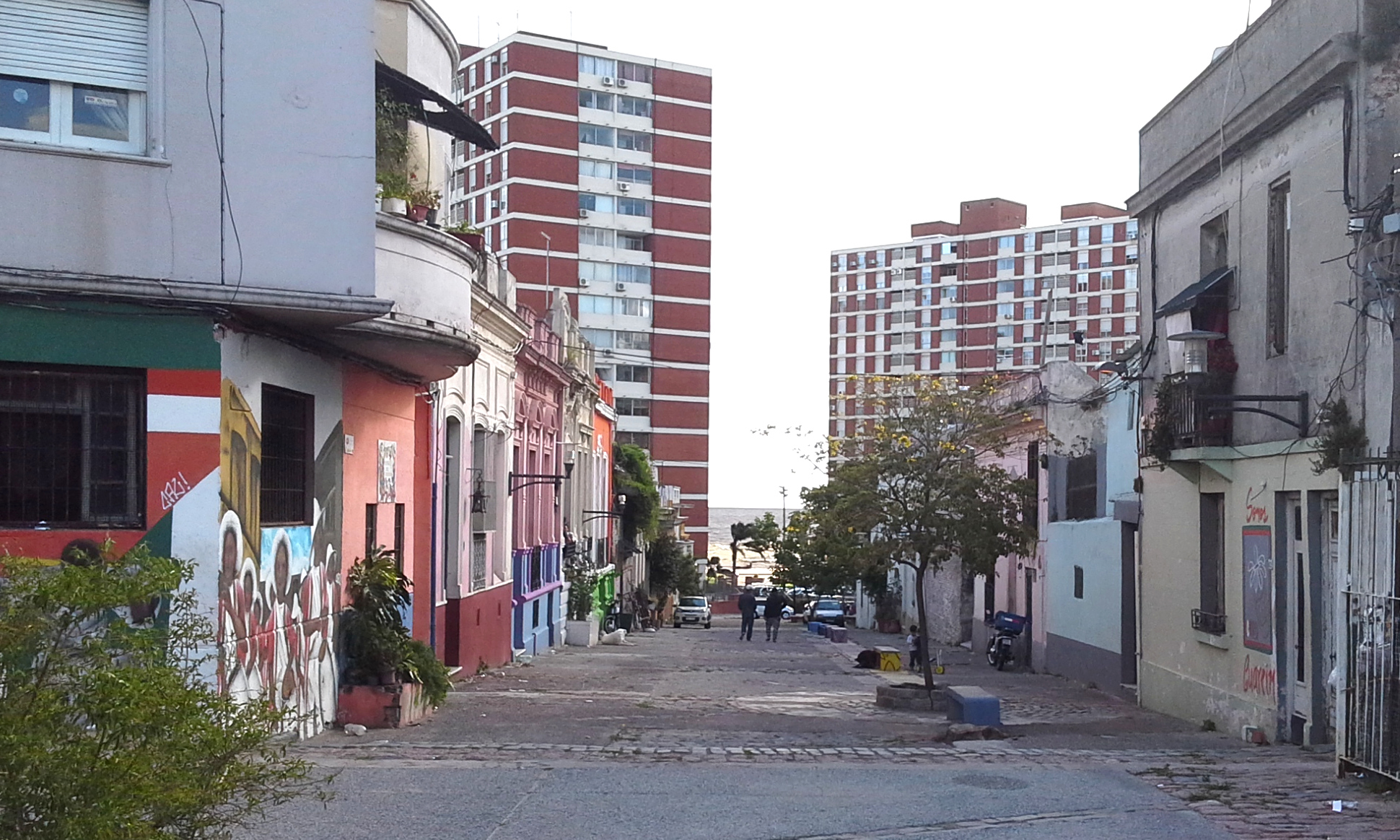 Vista hacia el sur con el Río de la Plata al fondo.